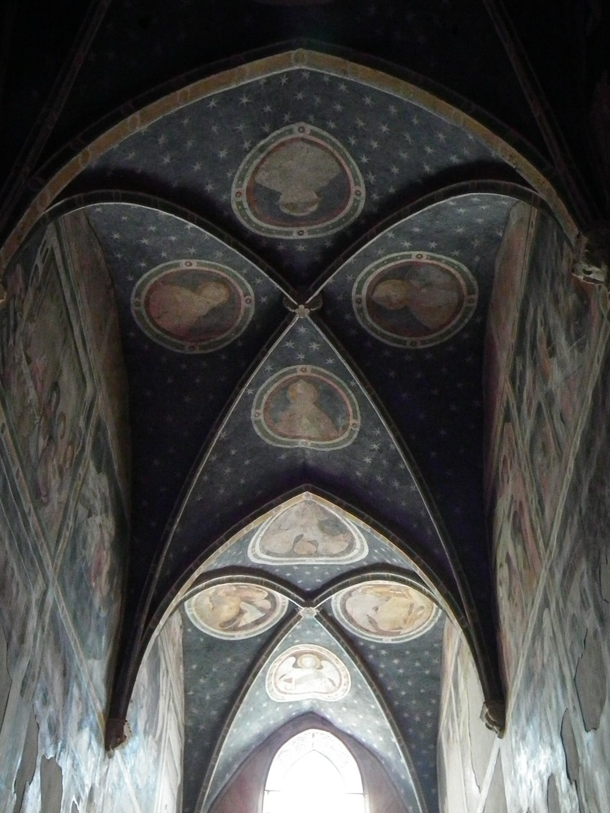 Cappella di San Giovanni Church of the Dominican Order Native nameChiesa dei DomenicaniLocationBolzano, ItalyCoordinates46° 29′ 51.39″ N, 11° 21′ 07.39″ E